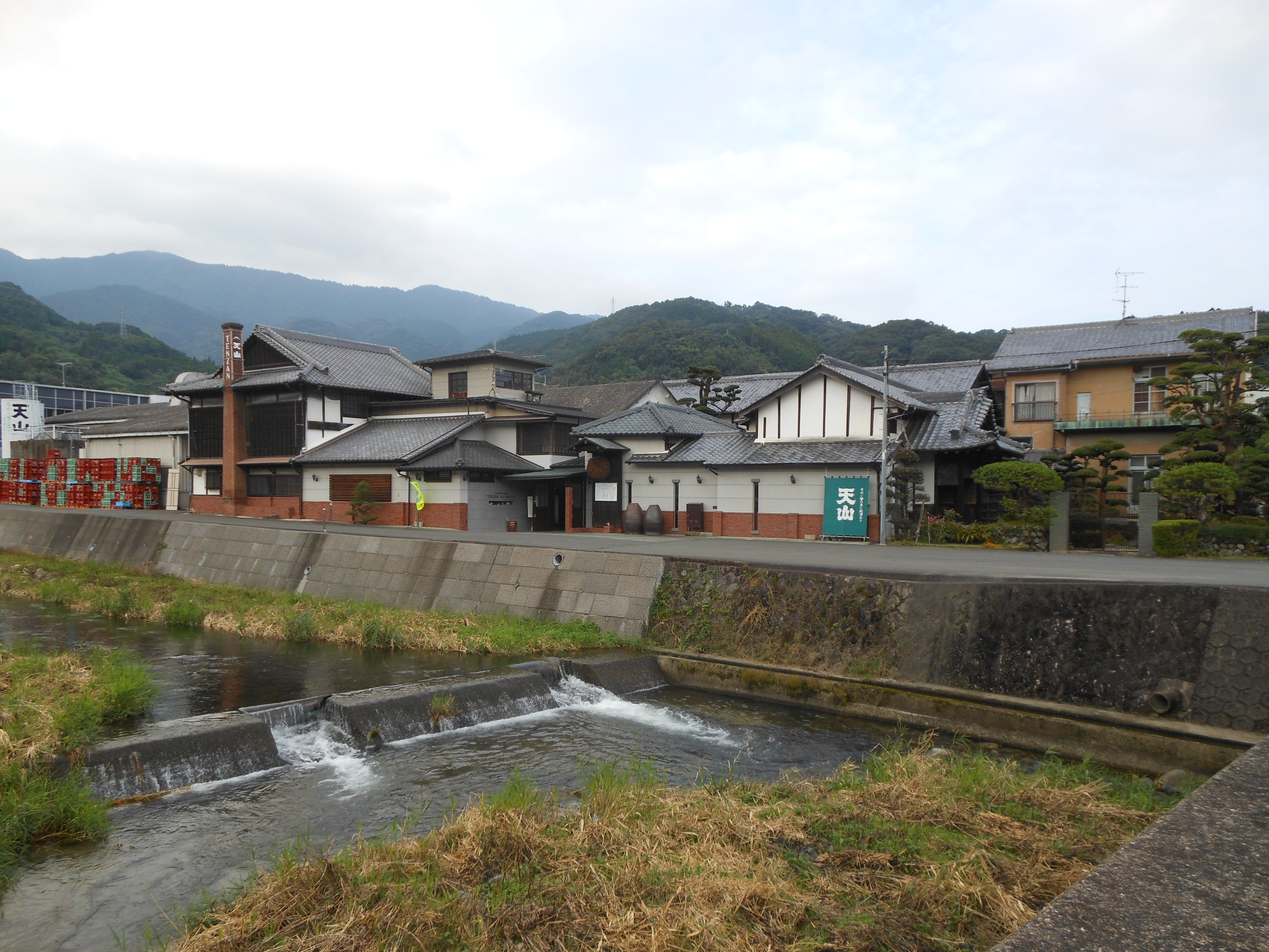 佐賀県小城市小城町岩蔵の天山酒造。酒蔵は登録有形文化財及び「22世紀に残す佐賀県遺産」に登録されている。